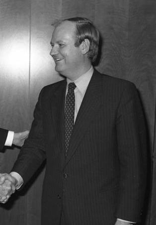 Dietrich Stobbe und Ronald Reagan